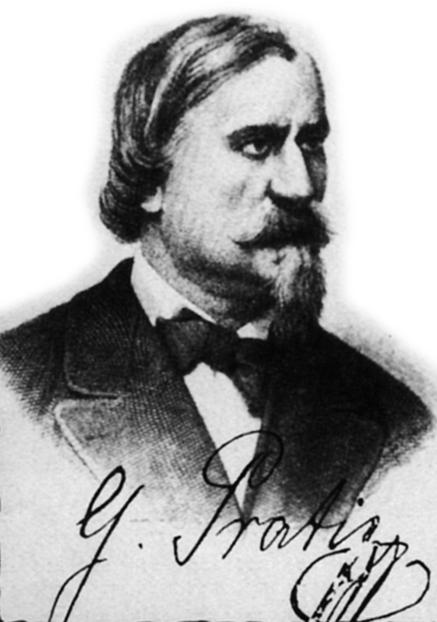 Giovanni Prati (Dasindo di Lomaso, province autonome de Trente, 27 janvier 1815 - Rome, 9 mai 1884), poète italien du XIXe siècle.